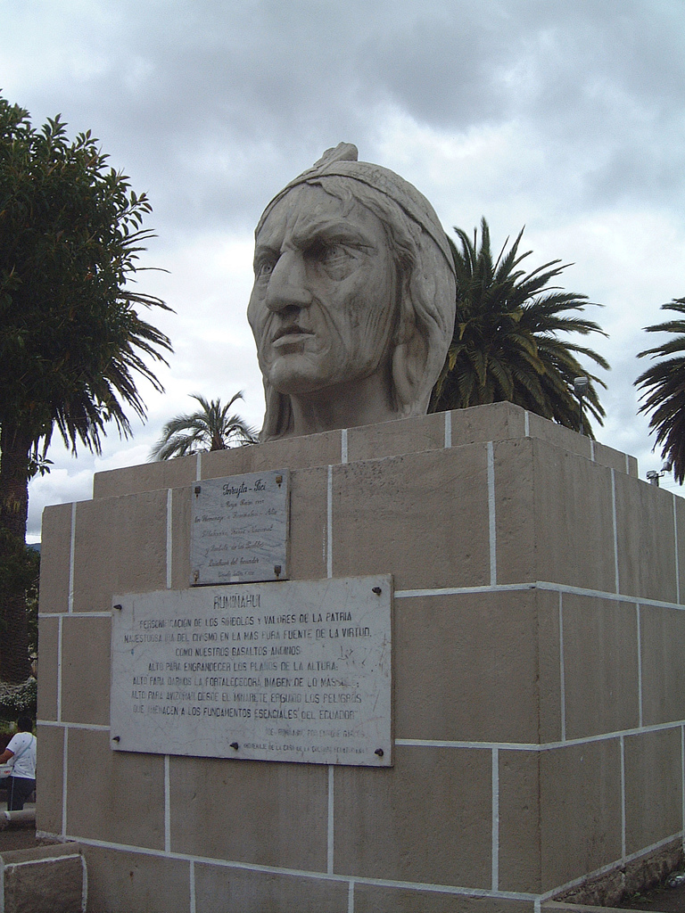 Rumiñahui Monument, Otavalo, Ecuador